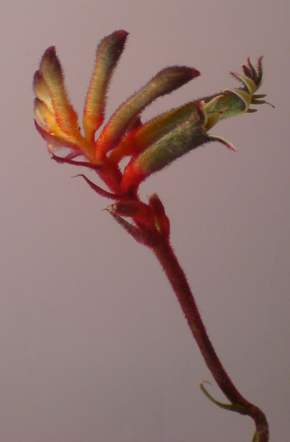 Цветок "кенгуровые лапки" - эндемик Западной Австралии.